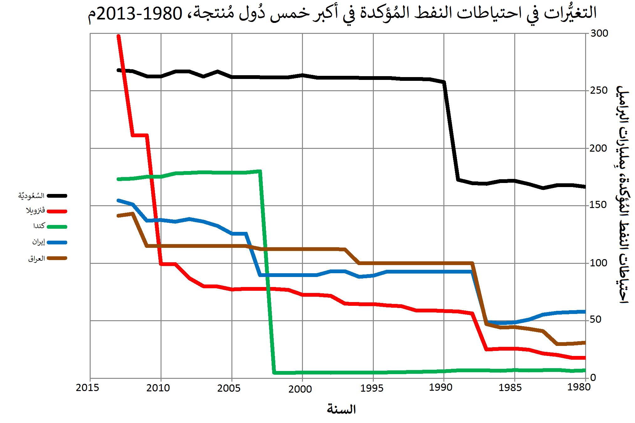 احتياطيات النفط المؤكدة لأكبر خمس دول بين عامي 1980-2013 (البيانات من ادارة معلومات الطاقة الامريكية.)